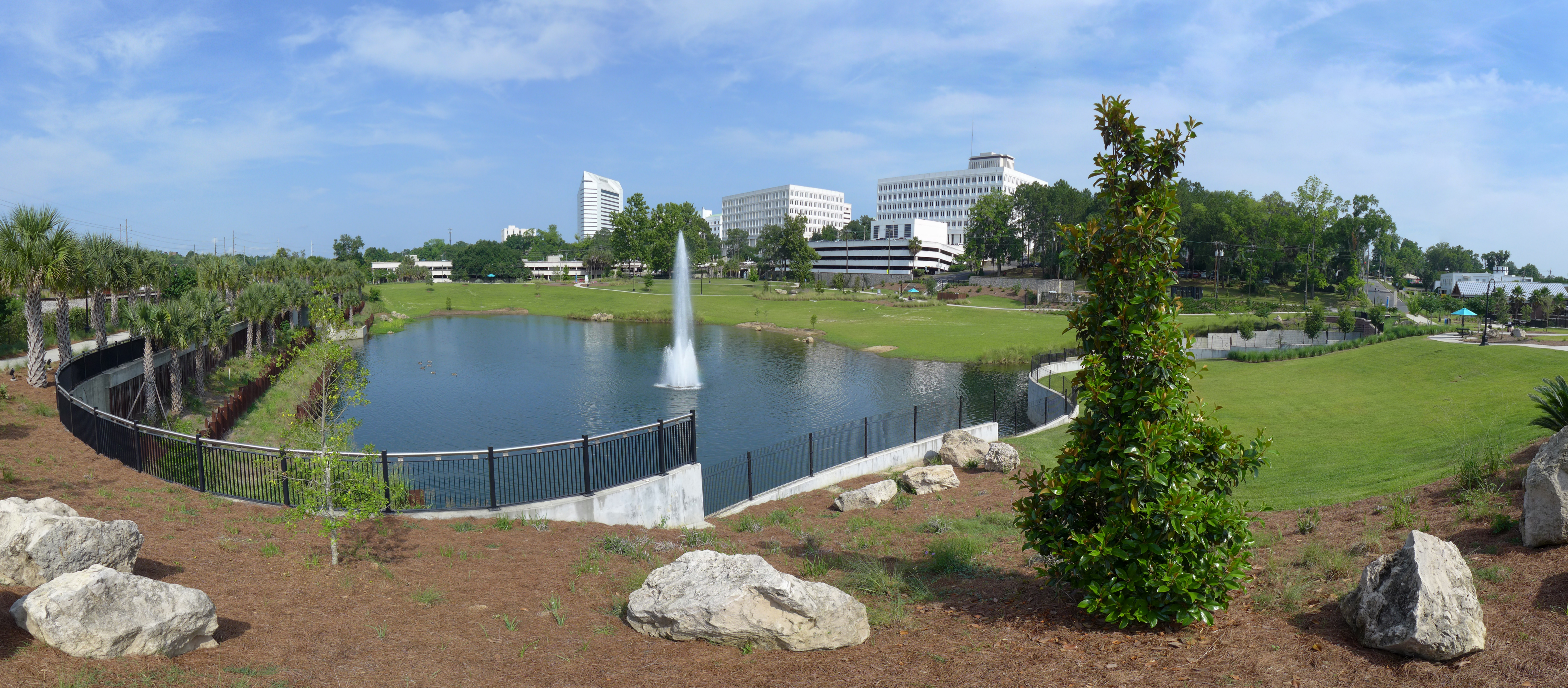 Cascades Park 2015.